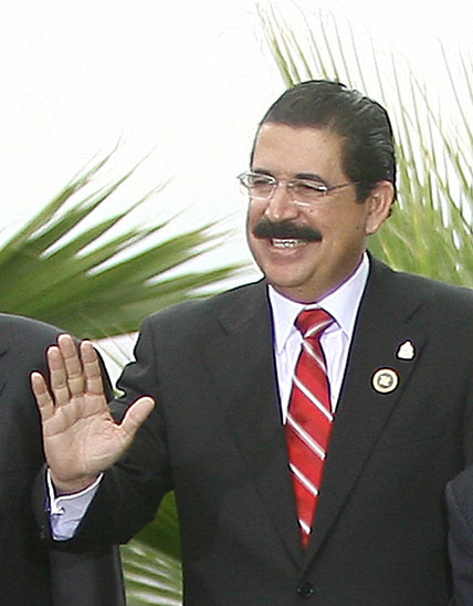 Manuel Zelaya en la foto oficial de los dirigentes que asistieron a La Cumbre Iberoamericana de 2007 en Santiago de Chile.